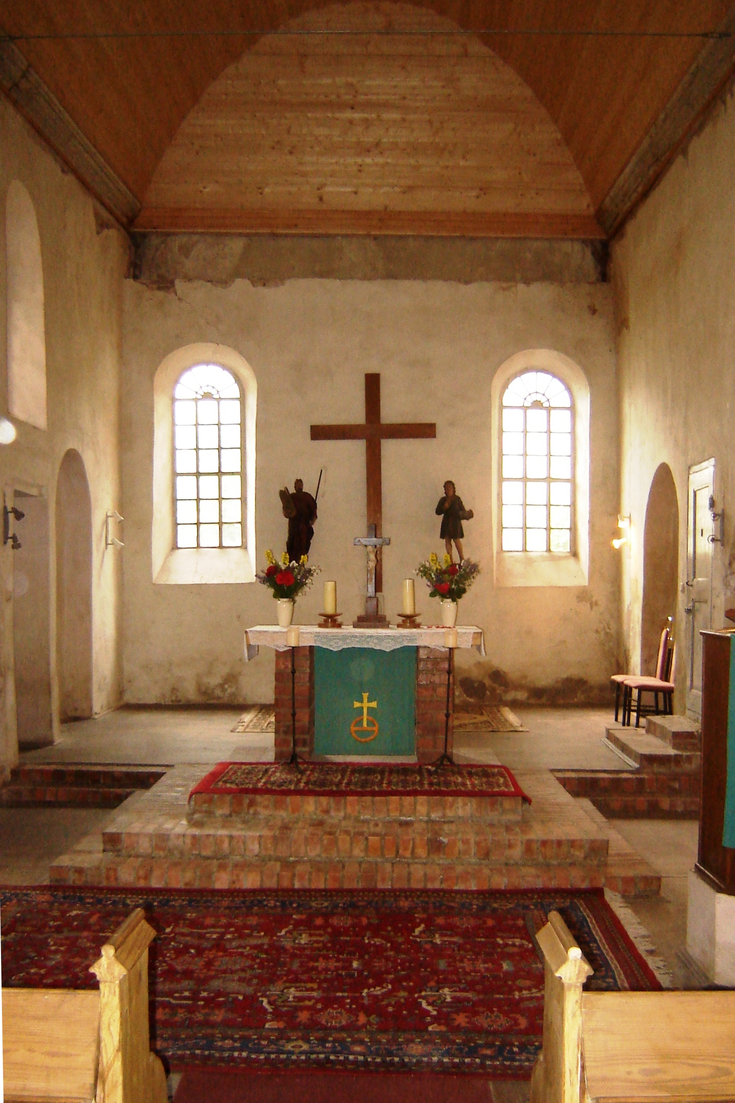 St.-Salvator-Kirche (Kleinmühlingen), Altarraum